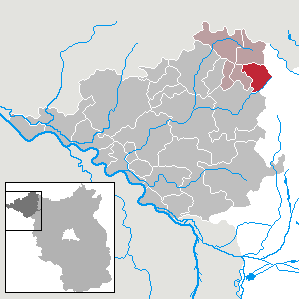 Halenbeck-Rohlsdorf in Brandenburg (Country) - District Prignitz